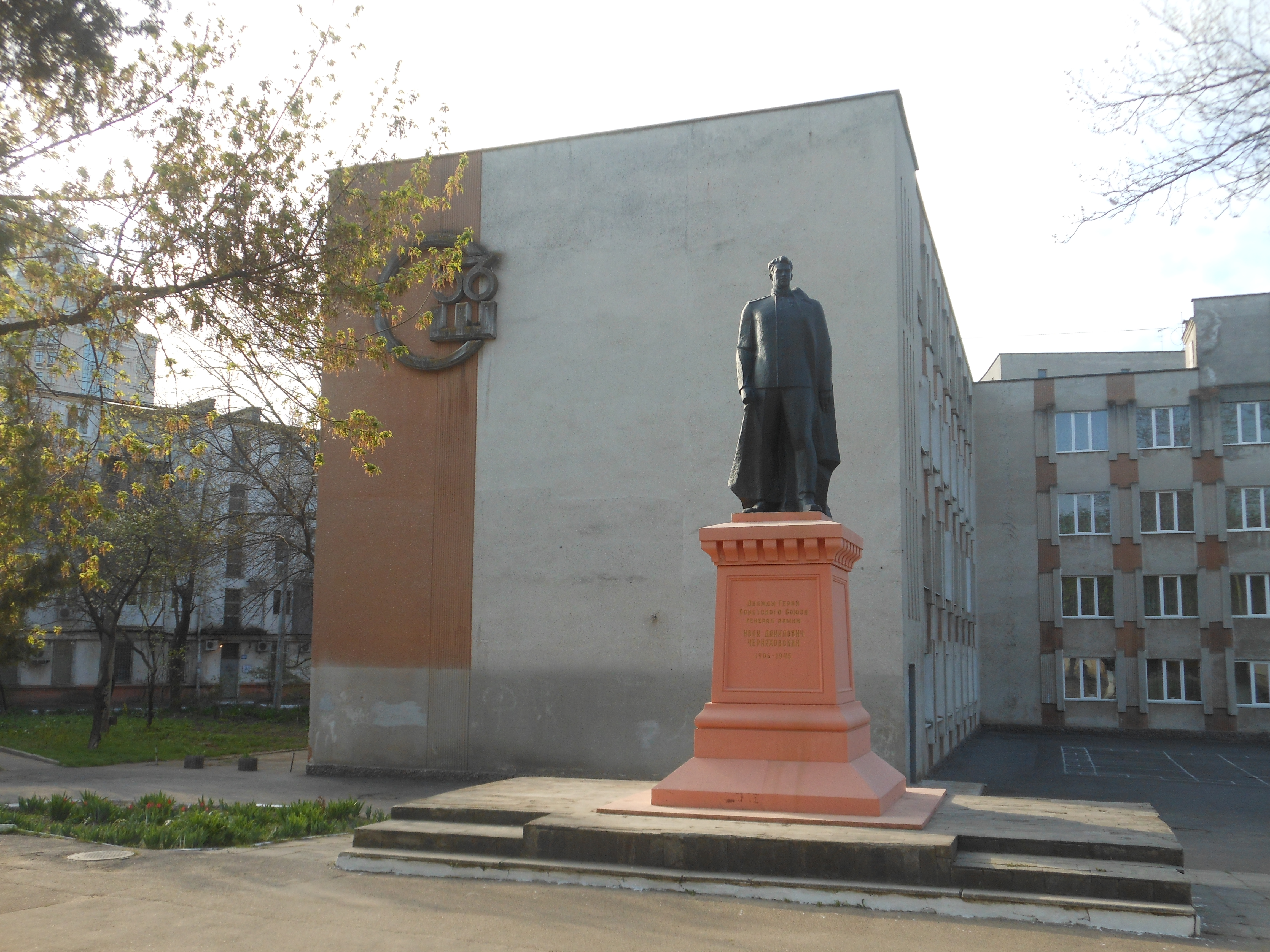 Пам’ятник І.Д. Черняхівському - двічі Герою Радянського Союзу, генералу армії, командуючому 3-м Білоруським фронтом, який навчався в Одеському піхотному училищі, Одеса, Тіниста вул., 1, ріг Черняховського, школа № 56